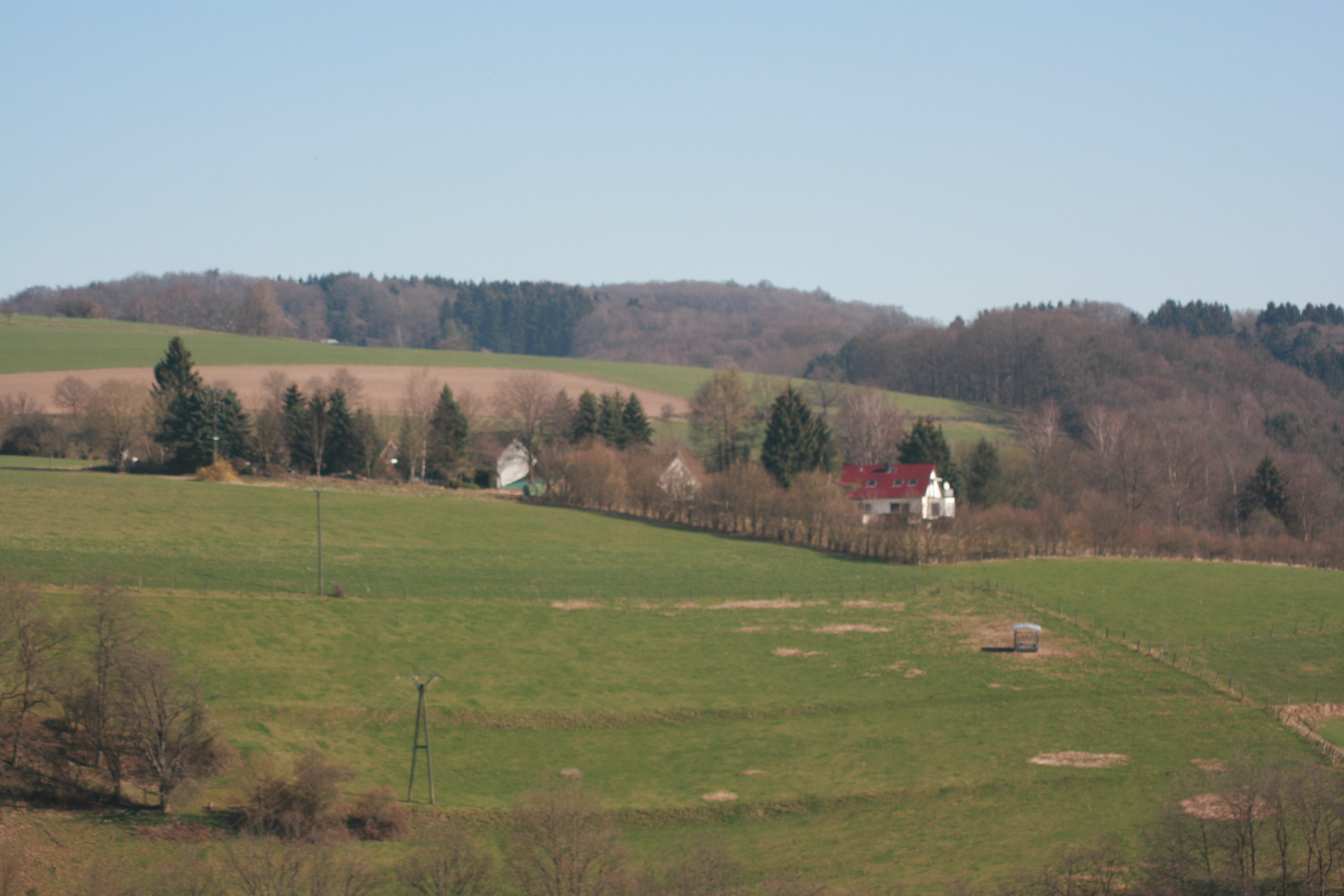 Waldbröl-Bettenhagen